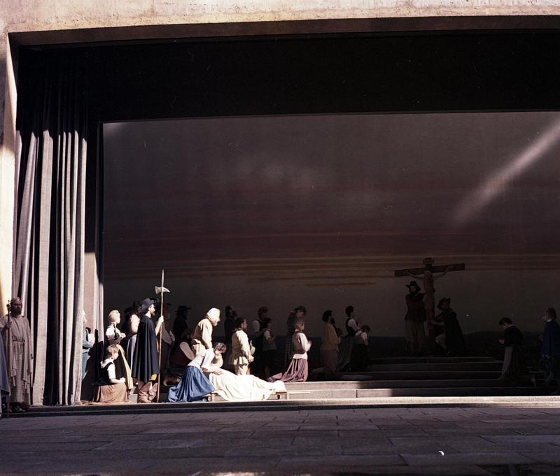 Oberammergau Reise Passionsspielszenen 14. Mai -18. Mai 1960